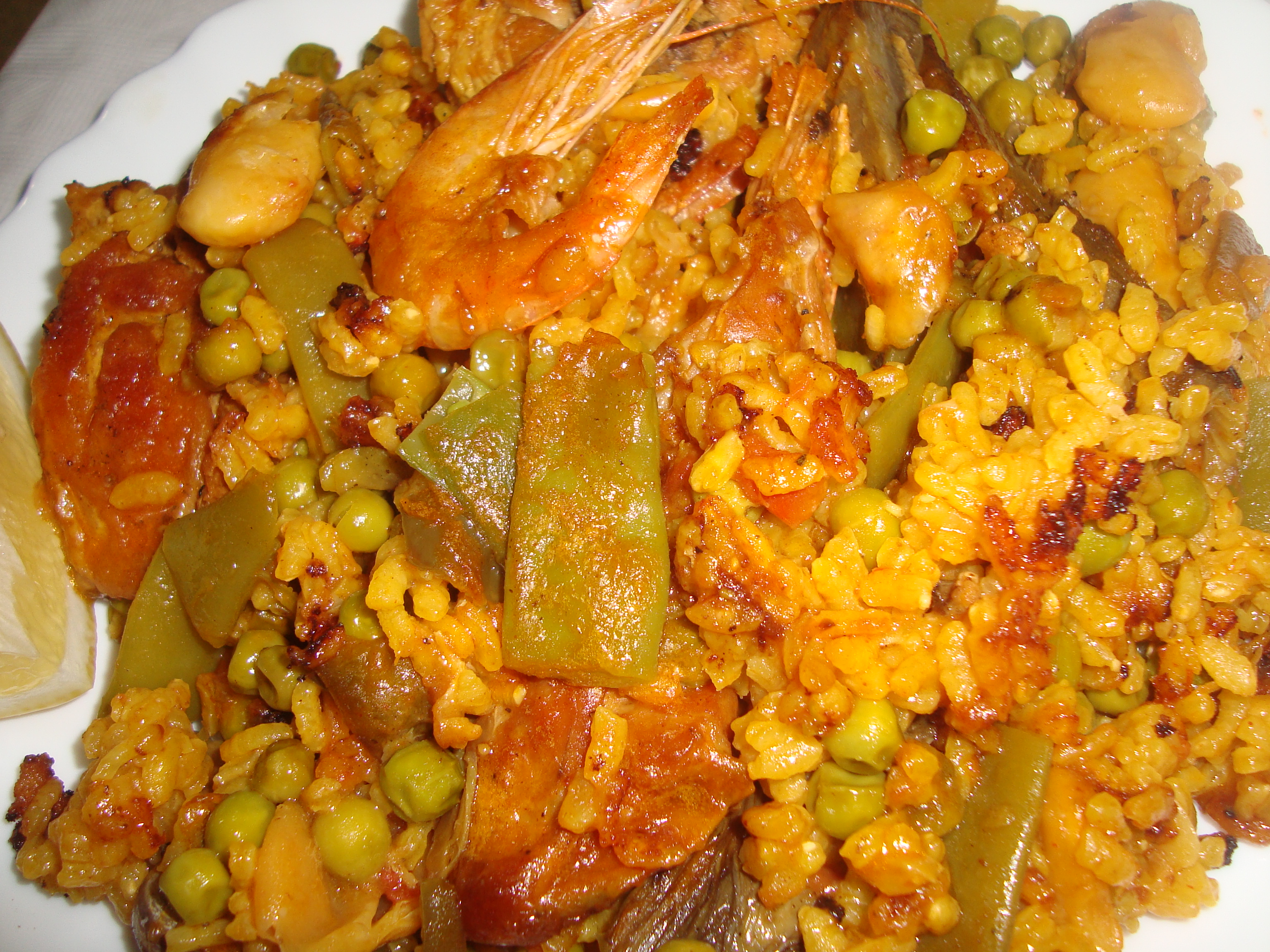 Plato de arróz en paella i socarraet de Castellón)